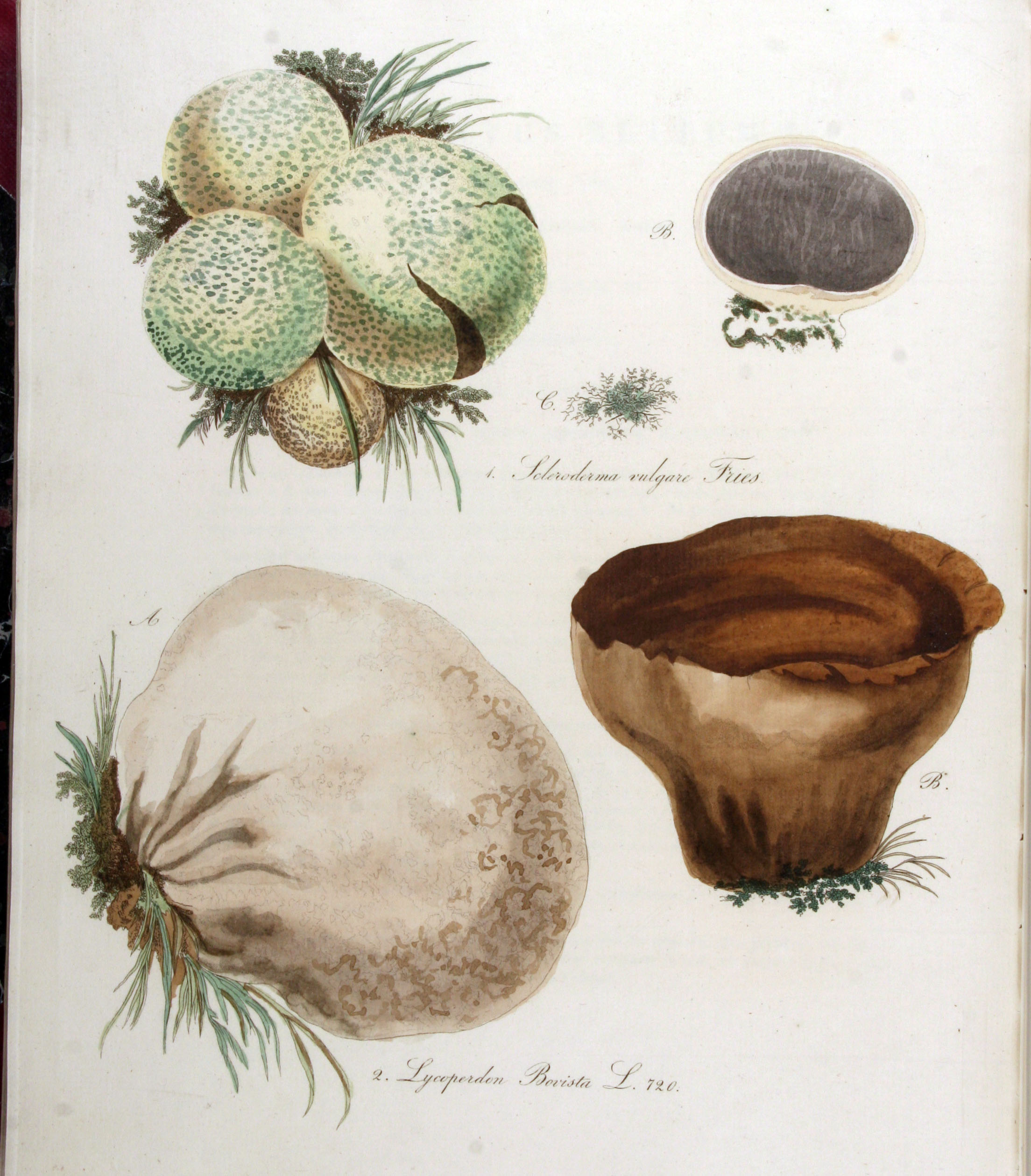 1. Scleroderma vulgare Hornemann 1829 2. Lycoperdon bovista Persoon 1801, syn. Lycoperdon bovista Linnaeus 1753